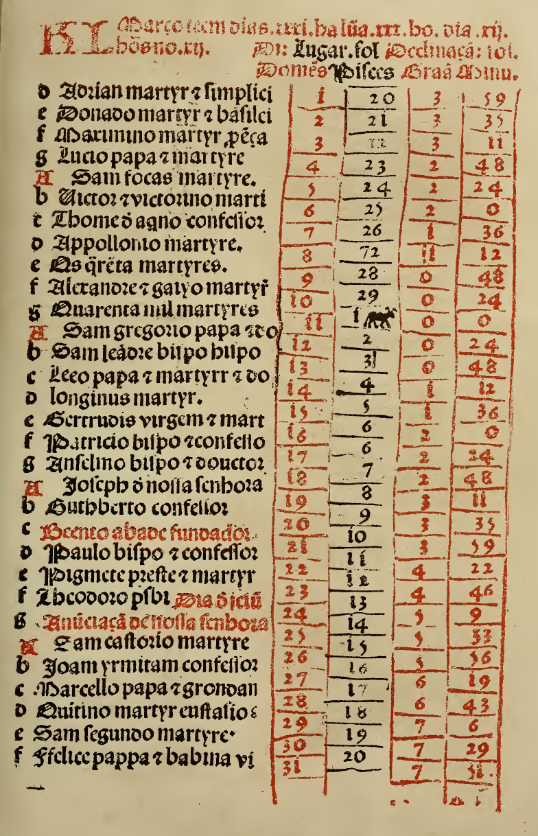 Une page du "Regimento do estrolabio e do quadrante", table solaire unique. Table du mois de mars : on y voit que la déclinaison vaut 0 le 11 mars, jour de l'entrée du Soleil dans le signe du Bélier (2 dernières colonnes).